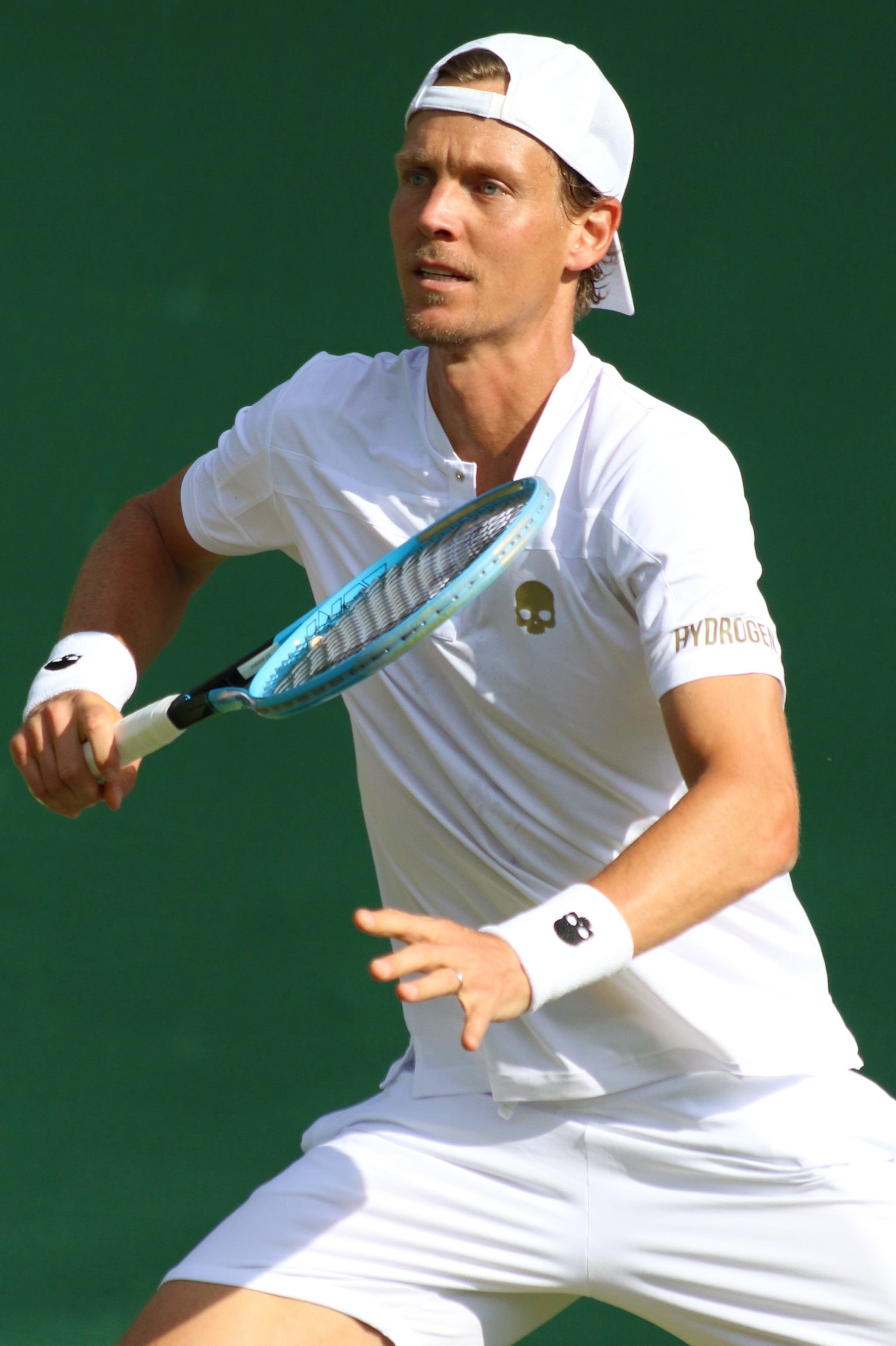 Berdych WM19 (9)